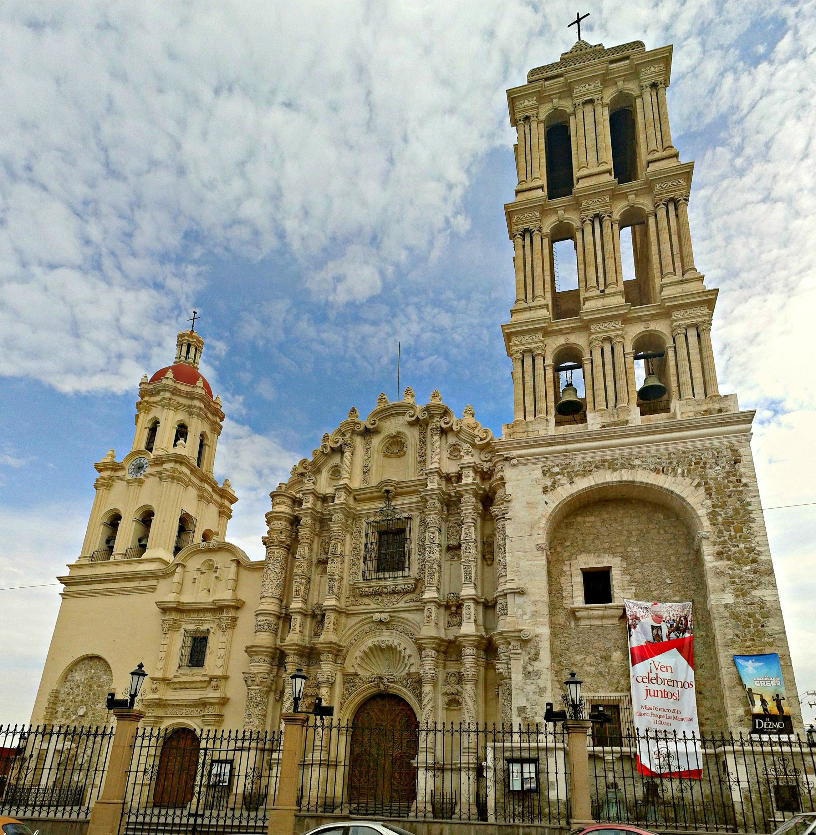 Catedral de Santiago, en Saltillo, Coahuila, México